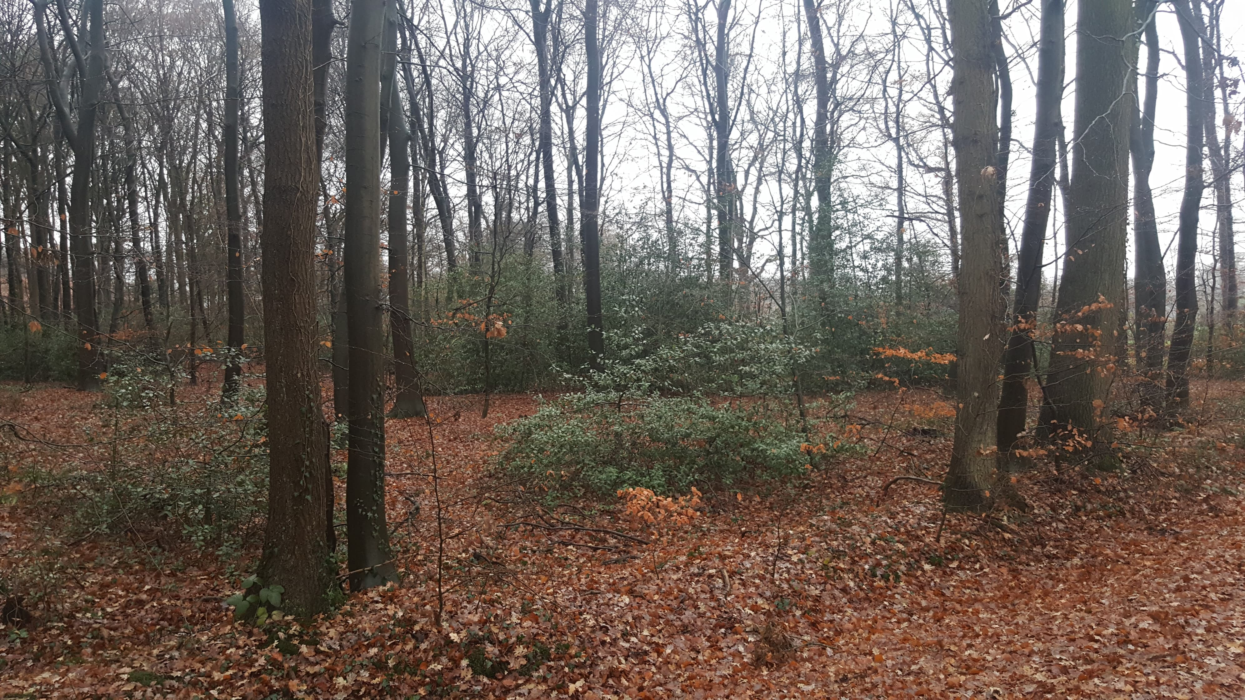 Die in Hülseberg häufig vorkommende Stechpalme(Ilex) nach dem der Ort benannt ist, in einem Wald in Hülseberg